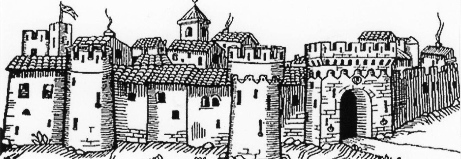 il castello di Salci (Umbria)